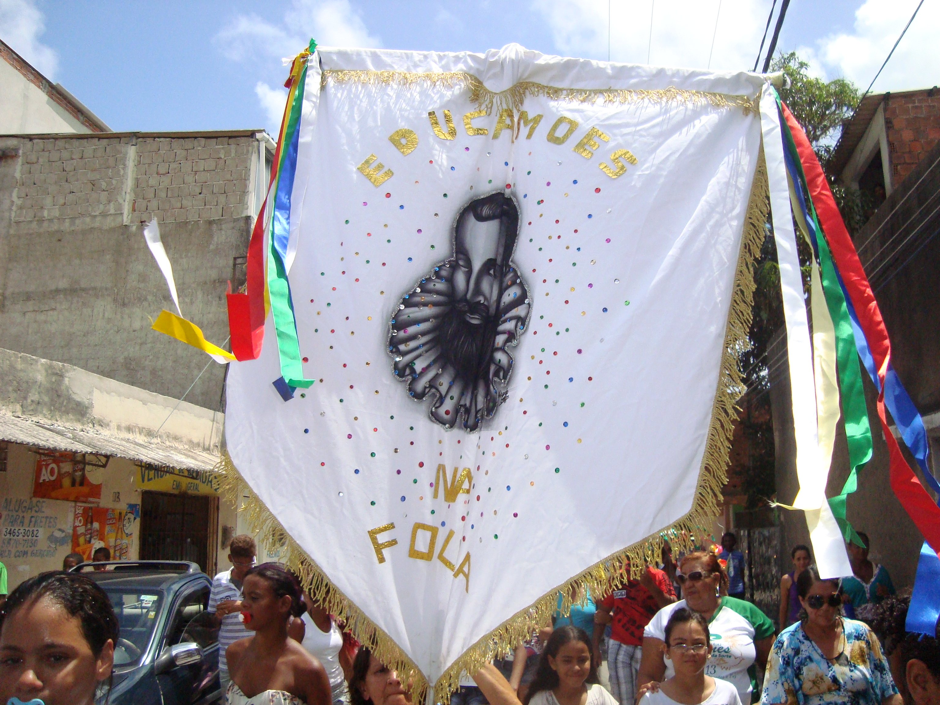 No Carnaval, já é uma Tradição do Bairro da Brasília Teimosa o desfile do Bloco "Educamões"